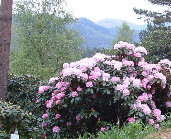 Rhododendron in Rogaland Arboret